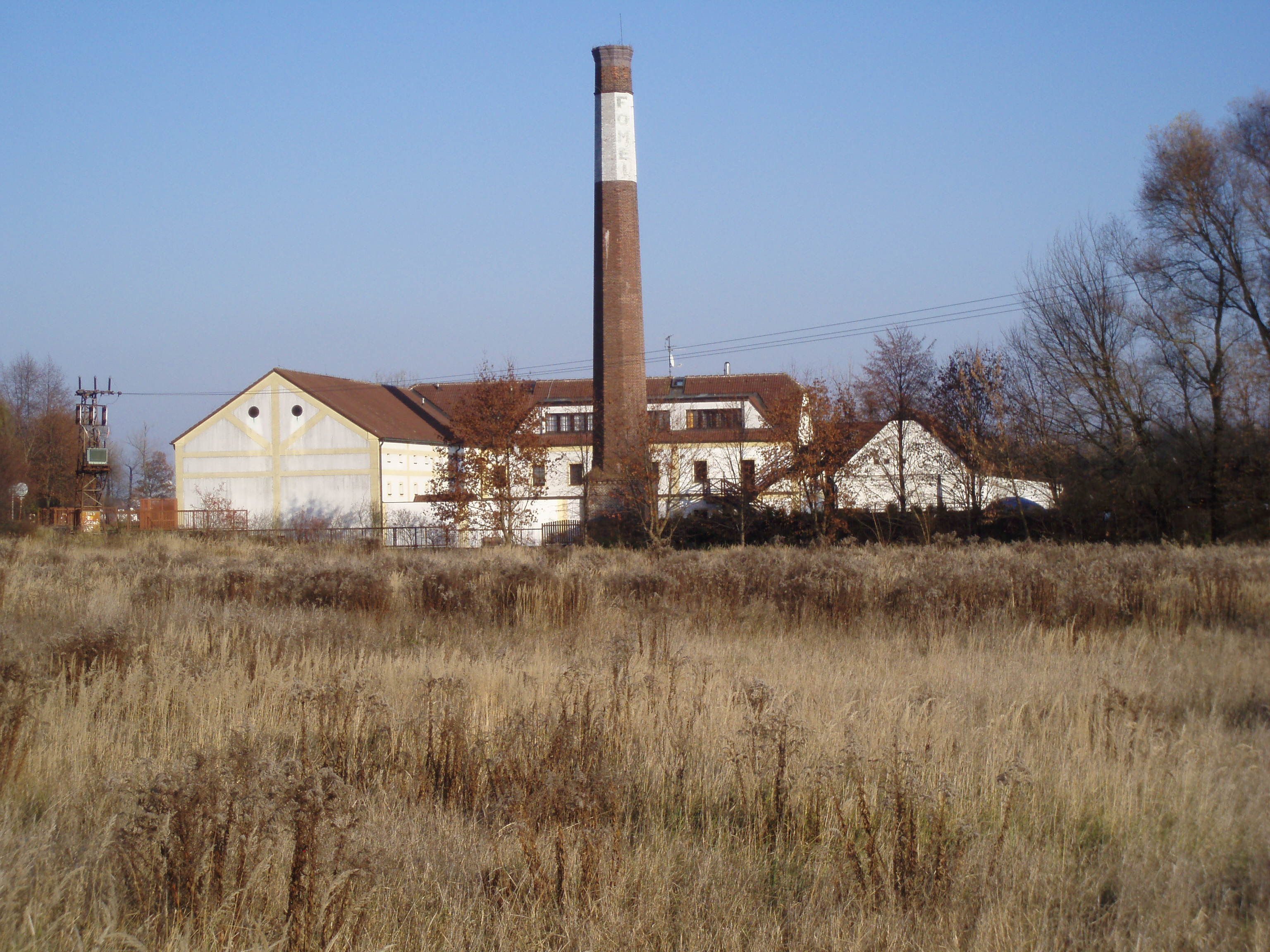 Bývalý Temešvárský mlýn